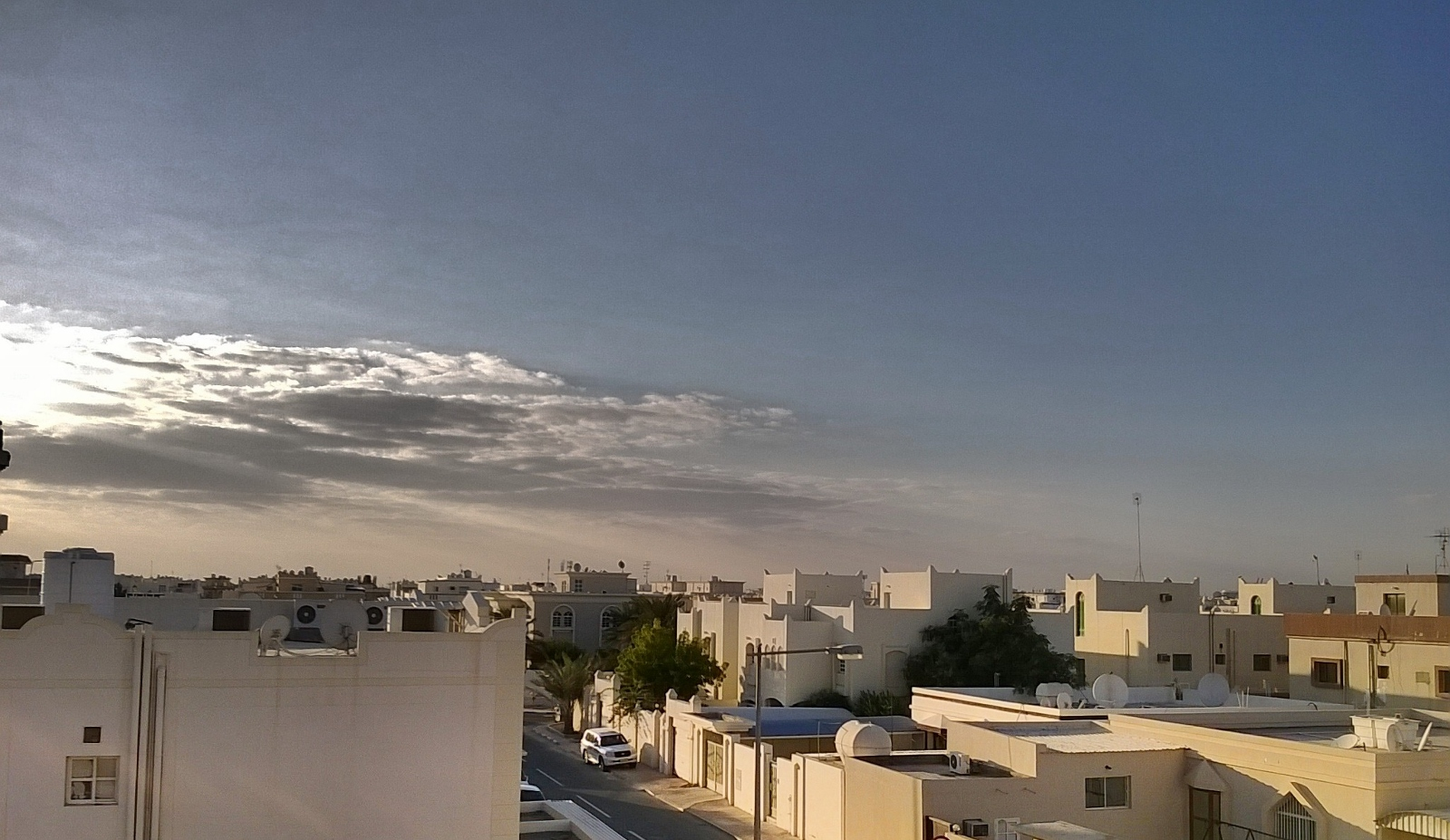 Al Mathar Al Ghadheem